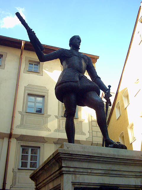 Regensburg (Bayern): Denkmal des Don Juan de Austria, Sieger in der Seeschlacht von Lepanto, neben dem Regensburger Rathaus. 1978 anlässlich des 400. Todestages von Juan de Austria aufgestellt, als Kopie eines älteren Standbildes von Andrea Calamech (1572) aus Messina. Bildautor: Peter Bubenik - Aufnahmedatum: 2004-04-13 - Lizenz: GNU-FDL Mehr Bilder aus Regensburg: Ein Abend an der Donau bei der Steinernen Brücke... Als in Regensburg noch Straßenbahnen fuhren - Modell des Arnulfsplatzes um ca. 1960 Der Goldene Turm Meditieren auf Rengschburgerisch: Der Spitalgarten in Stadtamhof an der Steinernen Brücke Das Wohnhaus des Astronomen Johannes Kepler und seiner Familie von 1626-1628 Der Erker des Reichstagssaals Die Porta Praetoria (2) Die Neugestaltung des Neupfarrplatzes Mitte der 90er-Jahre fand nicht nur ungeteilte Zustimmung... Der Brückturm neben dem Salzstadel (2) Die historische Wurstküche ("Wurstkuchl") am Marc-Aurel-Ufer Das Ostentor Das "Bruckmandl" (Brückenmännlein) in der Mitte der Steinernen Brücke Zeugl (bair. für "Aushängeschild") des historischen Lokals "Zum Walfisch" Regensburg (Bayern): Der Biergarten im Bischofshof neben dem Dom (2) Gedenktafel für Oskar Schindler, der nach dem Krieg in Regensburg wohnte Sitzung des Immerwährenden Reichstags in Regensburg im Jahr 1640